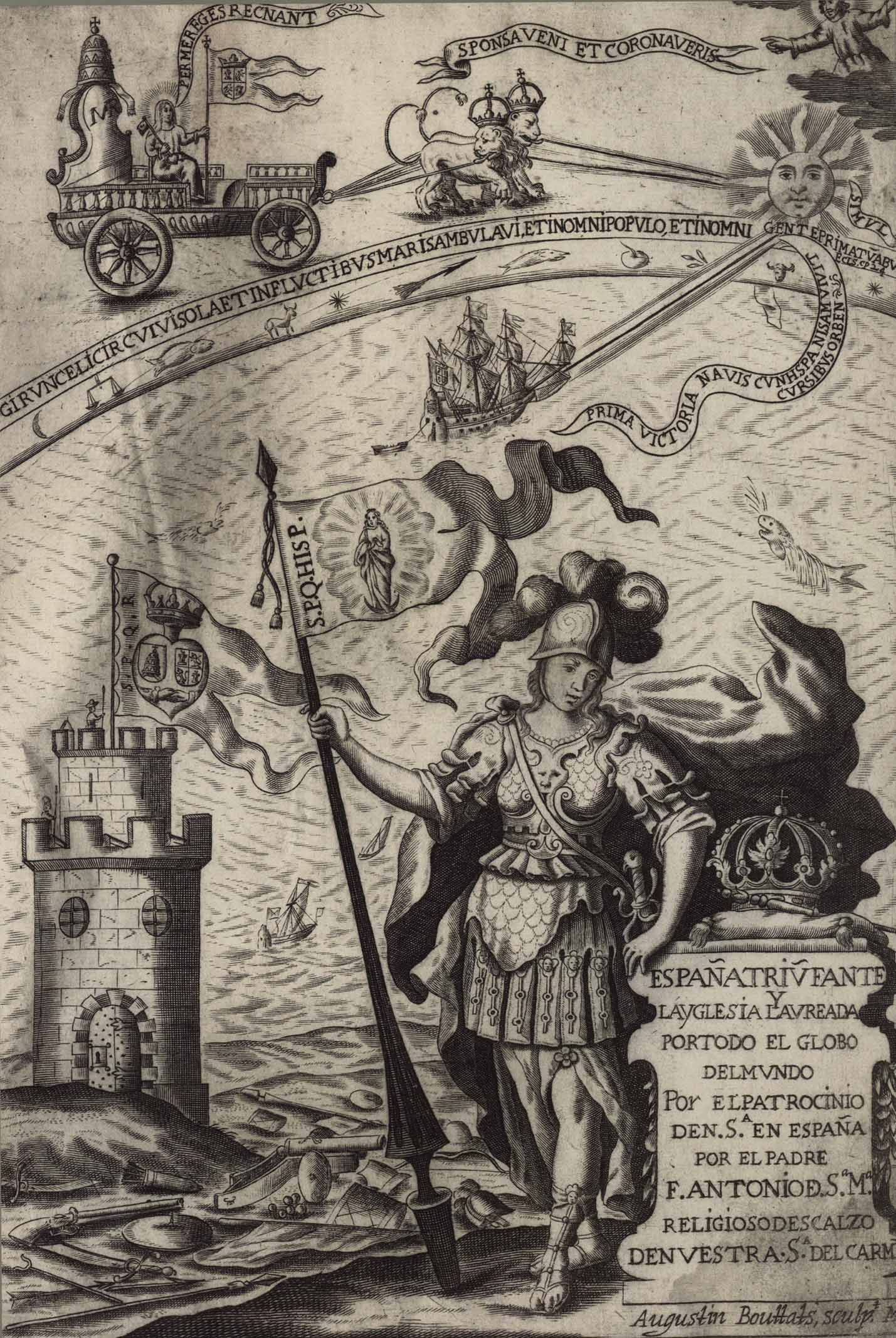 Grabado calcográfico. Ilustración de "España triunfante y la Iglesia laureada en todo el globo de el mundo por el patrocinio de Maria Santissima en España : finezas que Nuestra Señora ha obrado con España, obsequios y servicios con que han correspondido nuestros Reyes Catolicos ... : discursos historiales desde el nacimiento de Maria Santissima hasta la restauracion de la ciudad de Mecina y entrada de la Reina ... en su Real Corte, reinando ... Carlos II ..." de fray Antonio de Santamaría O.C.D. Impreso en Madrid por Julián Paredes, 1682. Estampa firmada ""Augustin Bouttats, sculpt. Md".